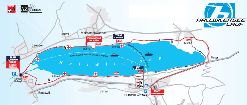 Streckengrafik Hallwilerseelauf